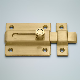 Pasador de Latón HerBron